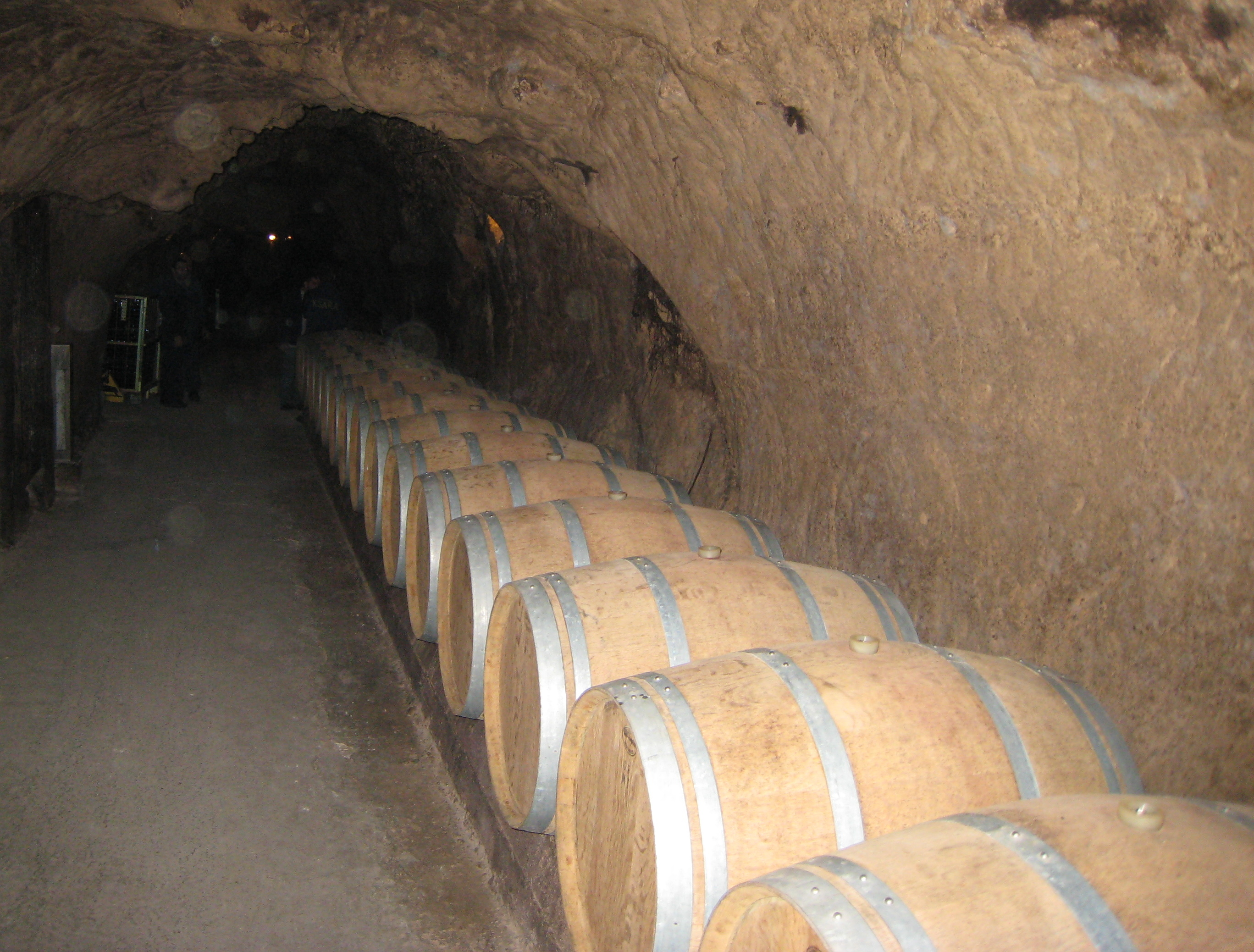 Ksara (Liban) : les fûts de chêne